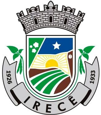 Brasão da cidade de Irecê.